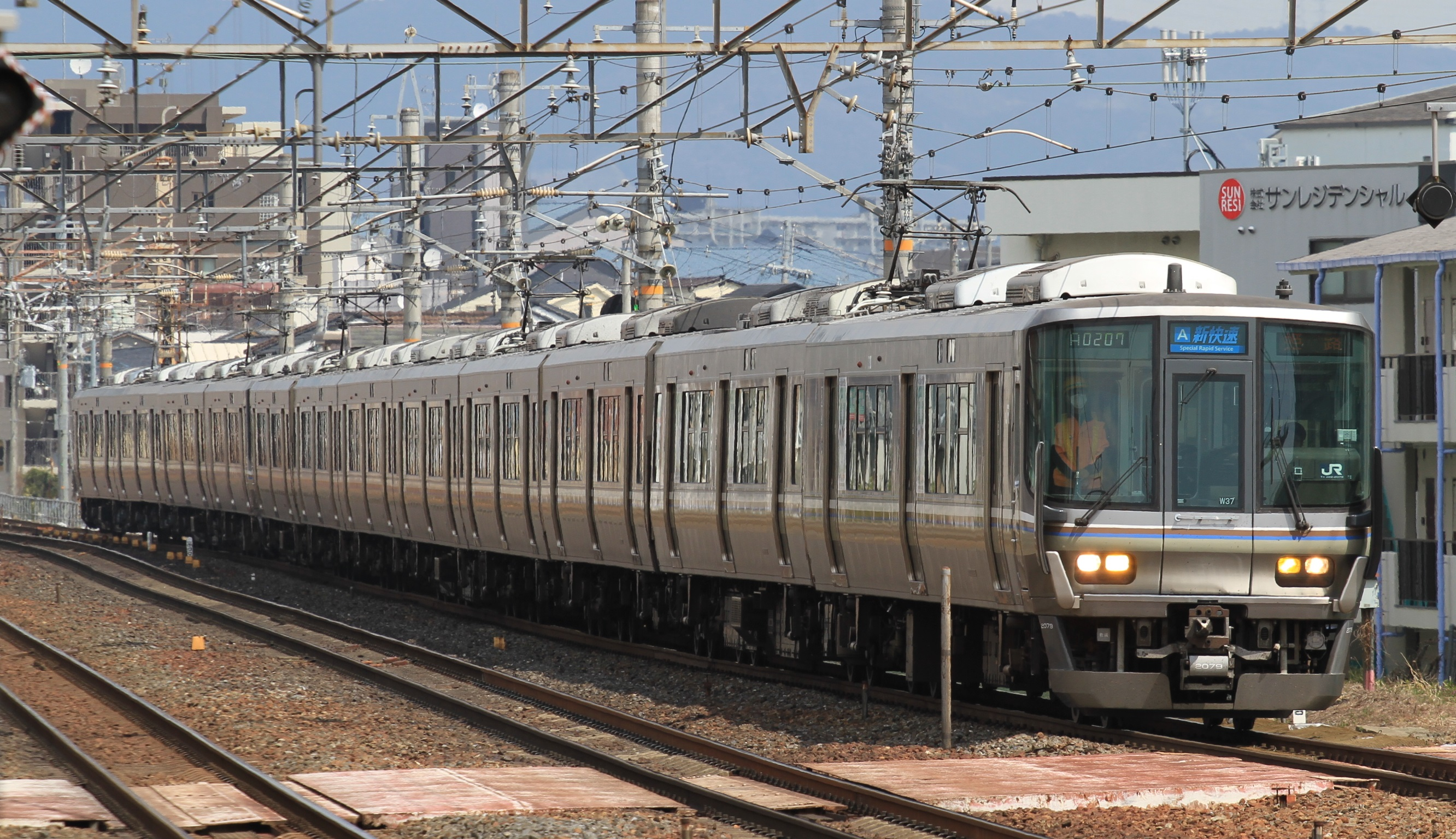 JR西日本 223系2000番台（転落防止幌設置車） JR京都線「新快速」